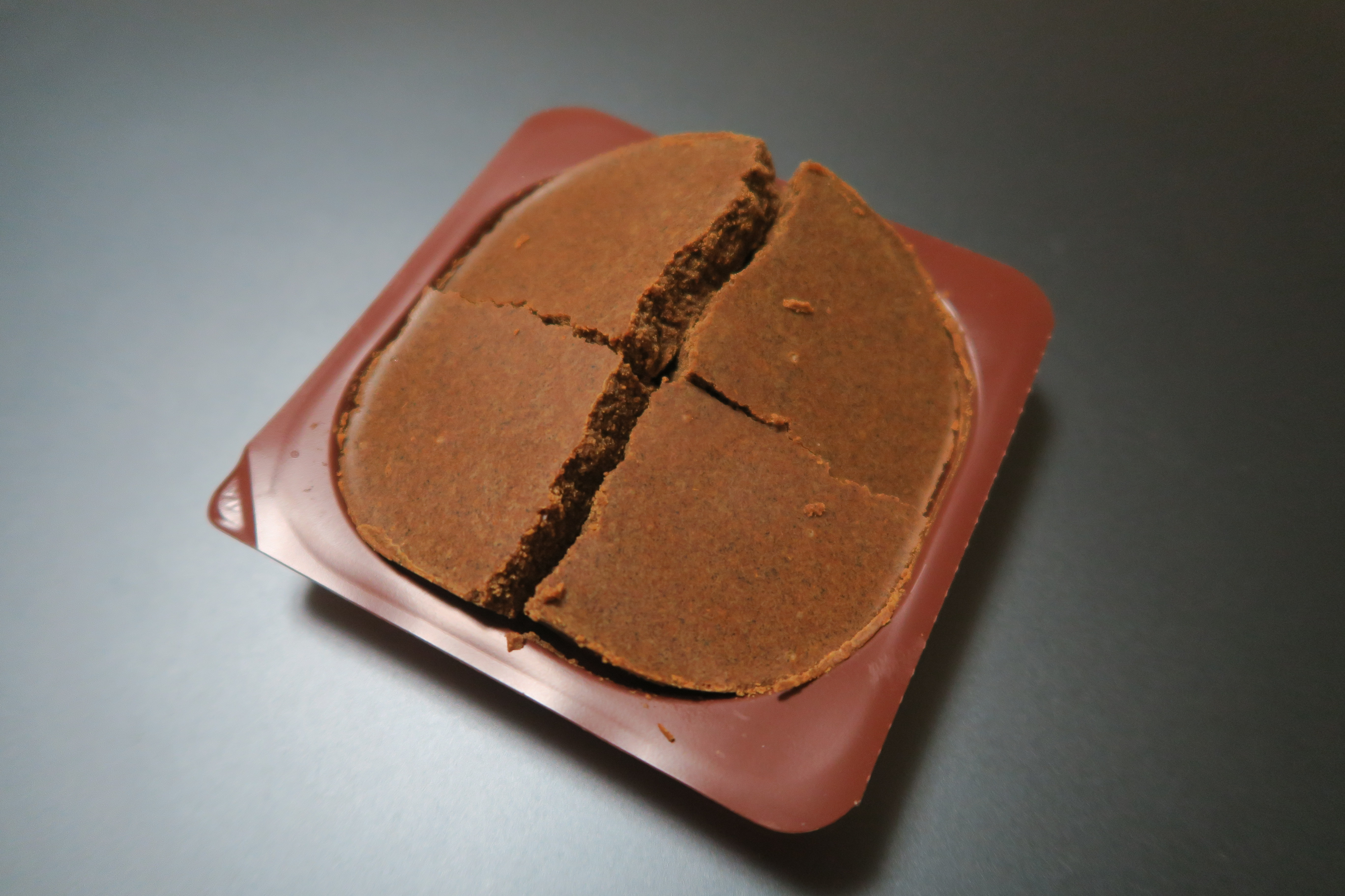 カレールーのブロック（折った後）、ハウス食品、4.5皿分（0.5箱）